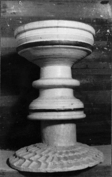 Dopfunt. Före konservering. Kategori: (04) DopfuntarDopfunt. Före konservering.